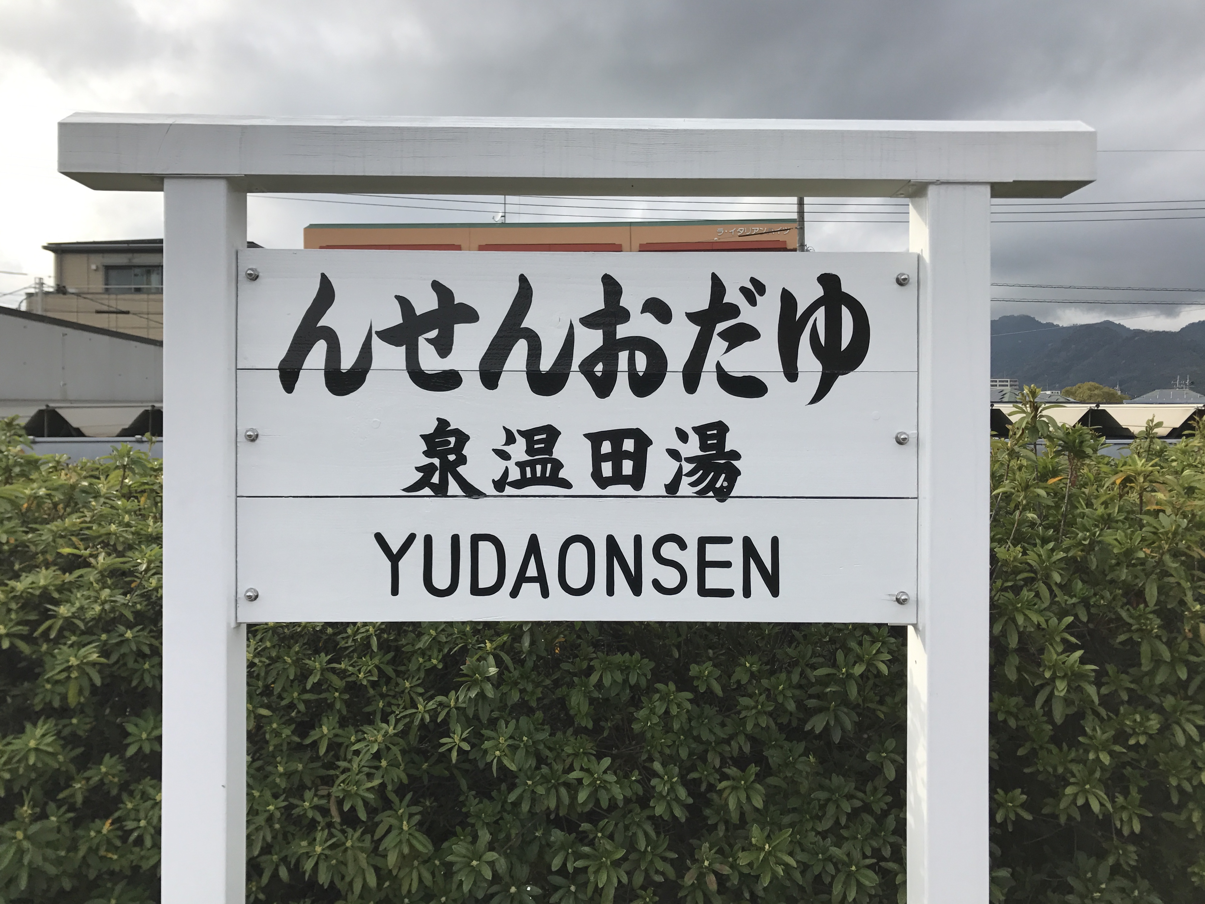 湯田温泉駅の観光用駅名標